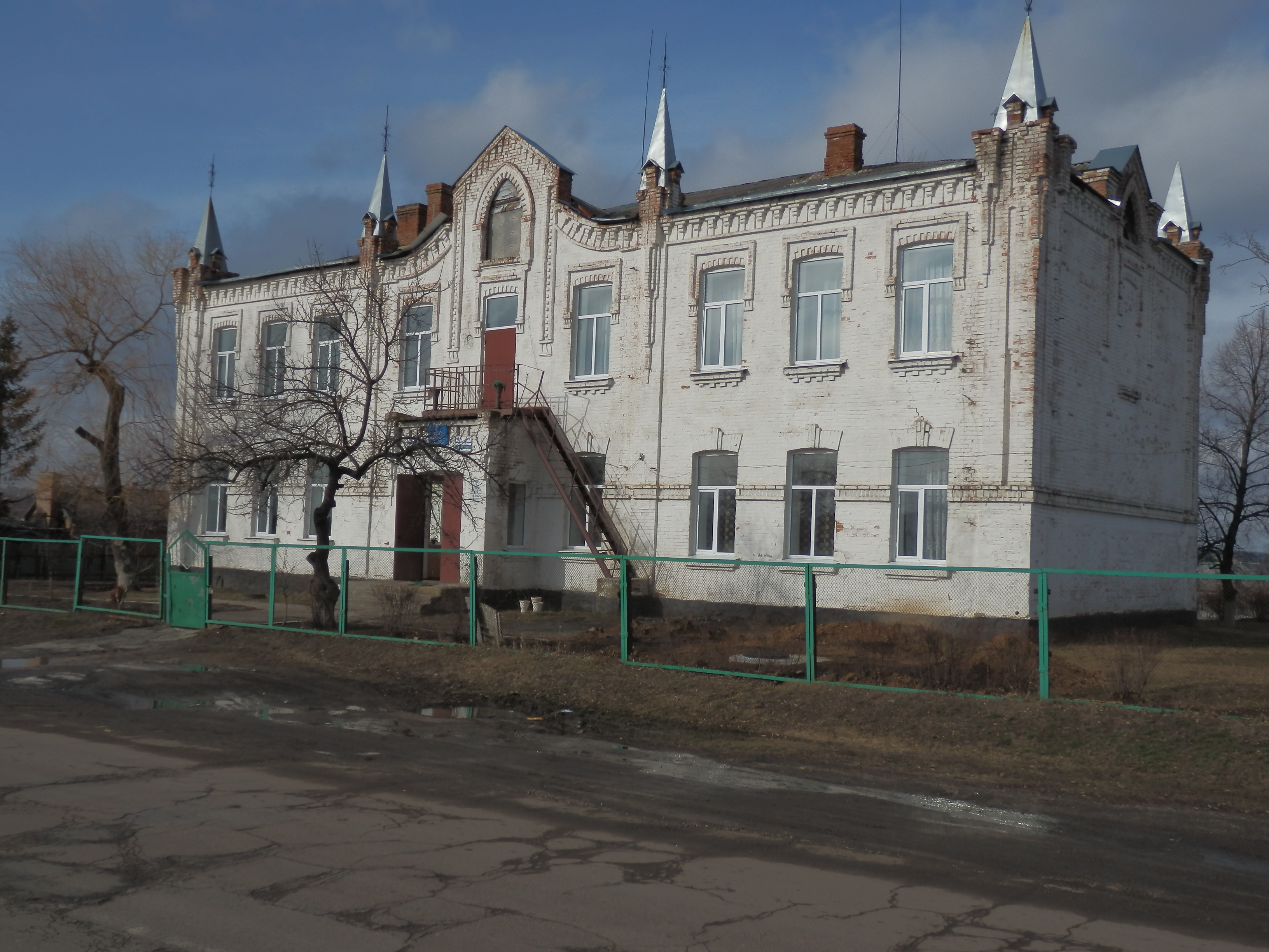 Будинок дитячого садка, Аджамка, вул. Урожайна (Пархоменка), 9